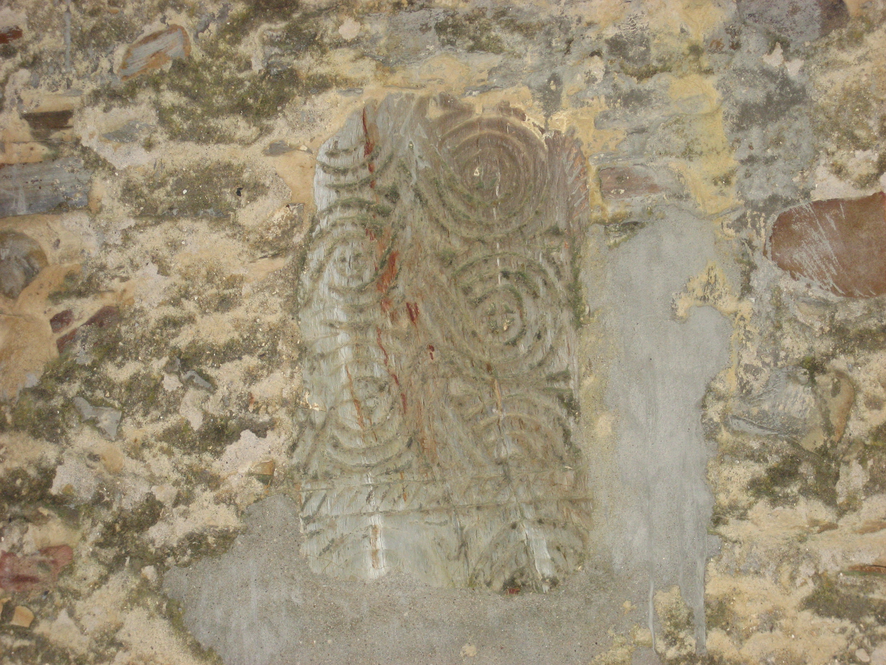 Lápida incrustada en la pared de una casa de Iglesia del Campo (Toral-Villadecanes), probablemente procedente del cercano Castro Bergidum